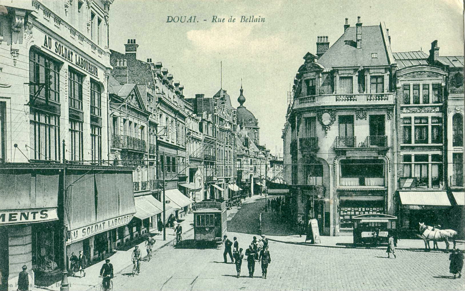 Carte postale ancienne éditée par Lion à Douai : DOUAI - Rue de Bellain